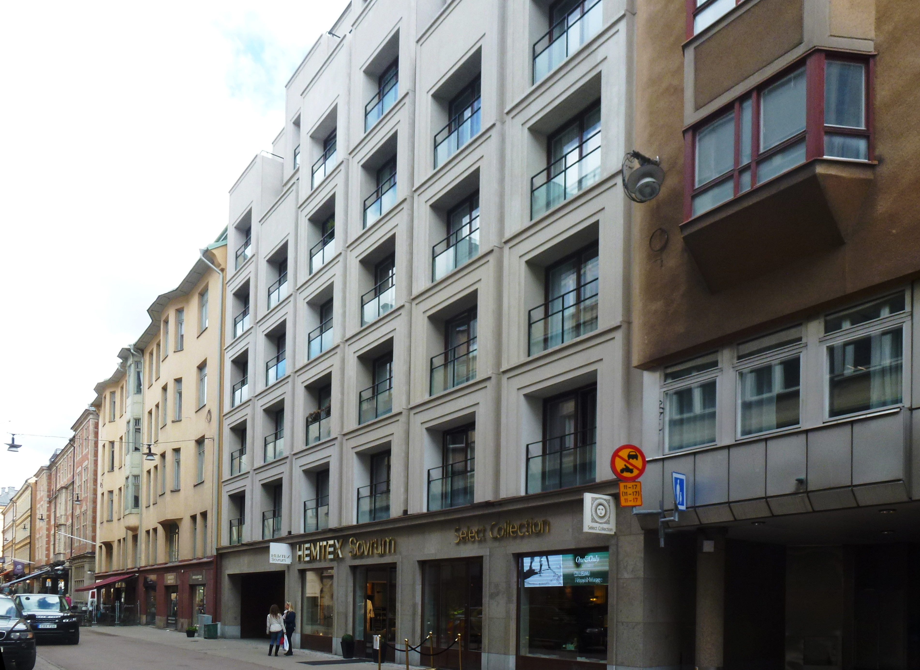 Grev Turegatan 8, nominerad till Årets Stockholmsbyggnad 2015